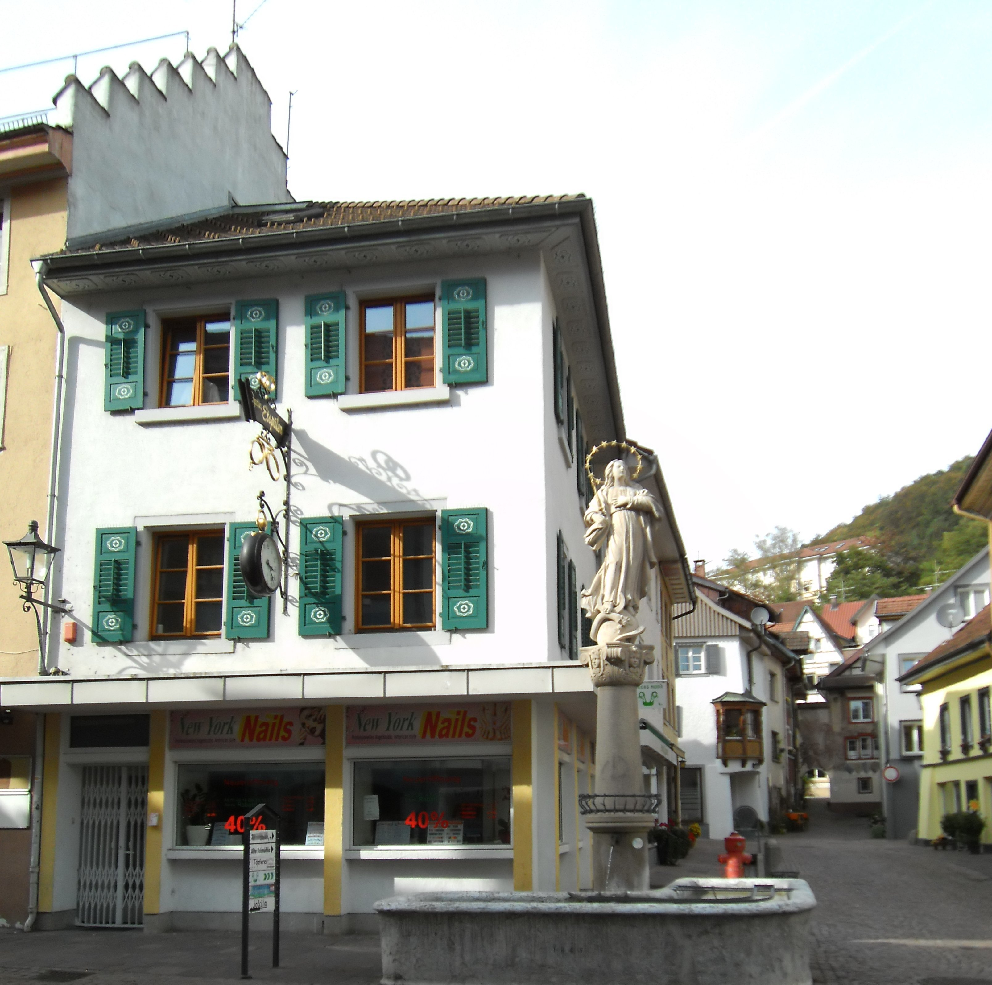 Marienbrunnen und Blick in die Priestergasse in Tiengen